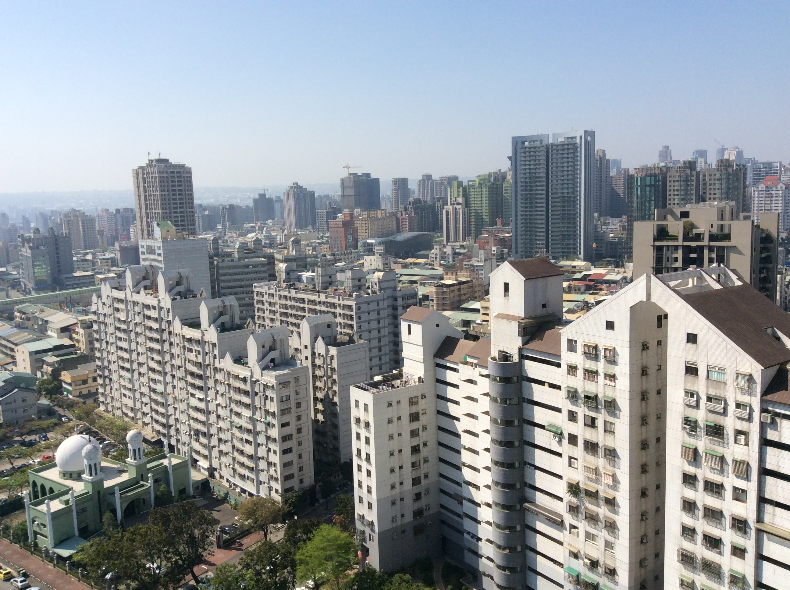 台灣台中市南屯區西北向市景